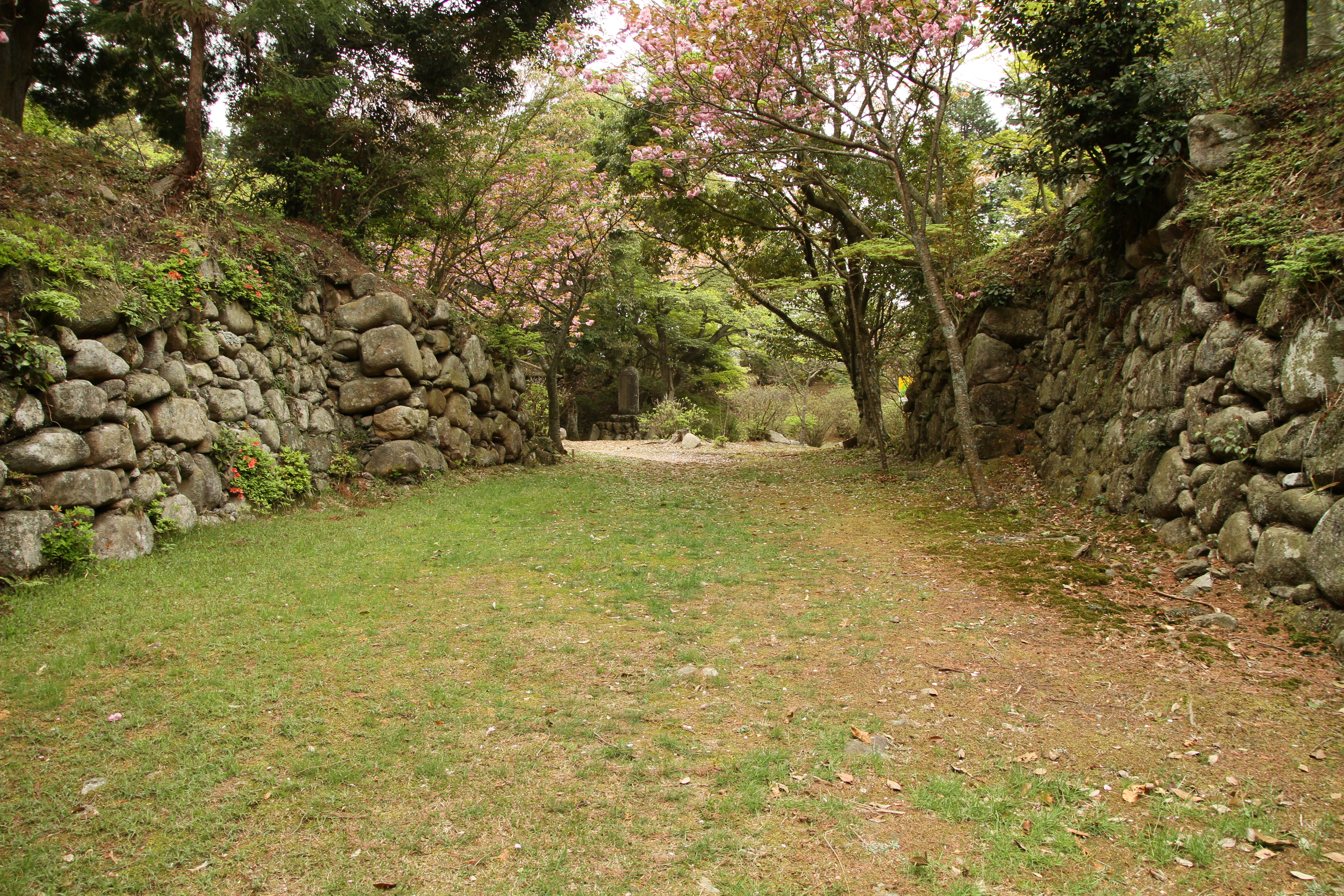 福地城の主郭虎口